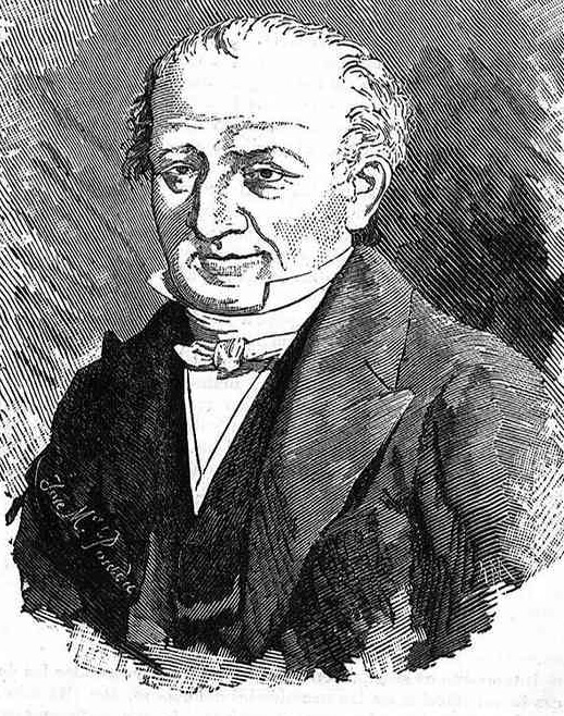 Norberto Velázquez Moreno